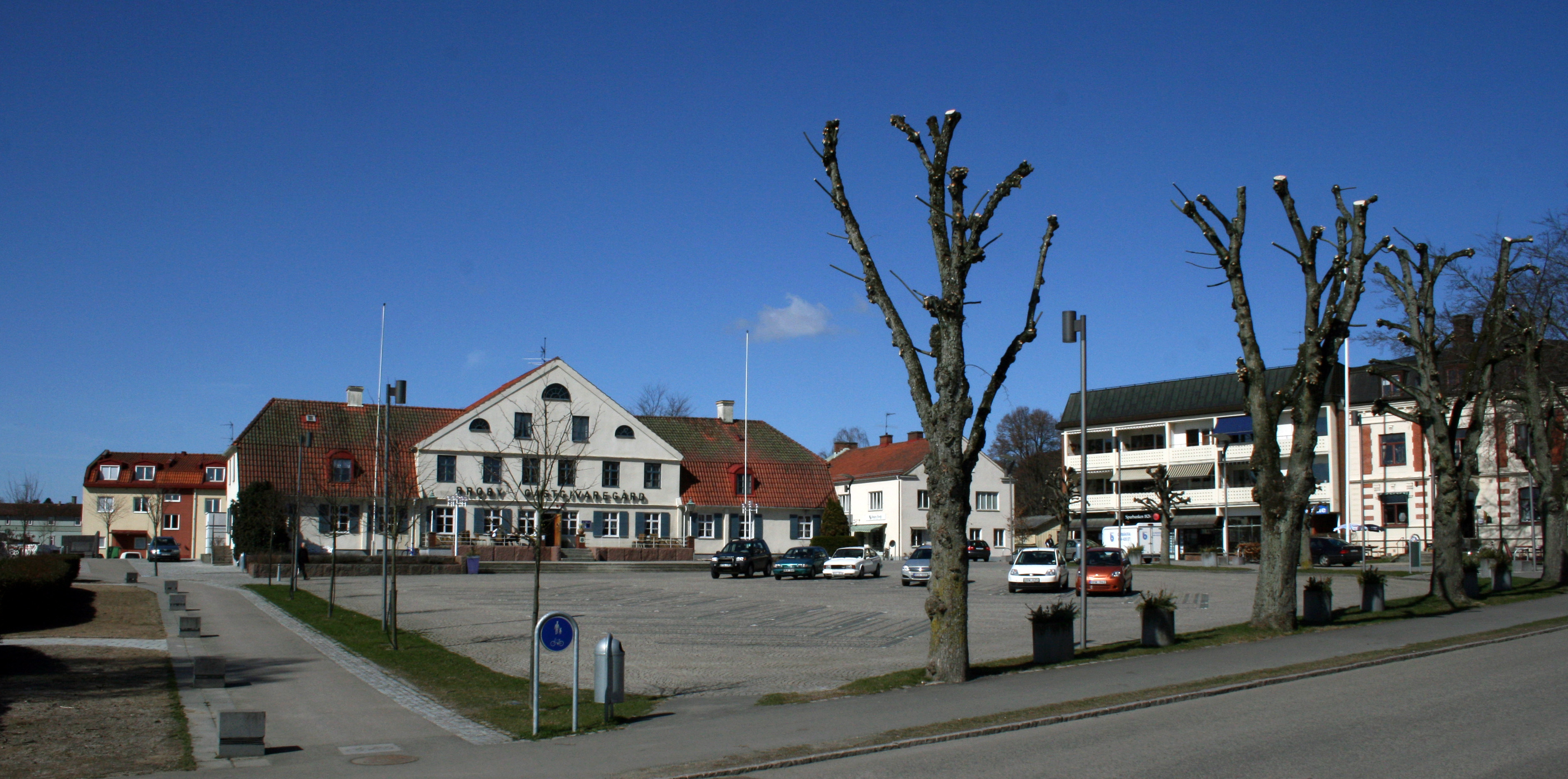 Torget och Gästgiveriet i Broby